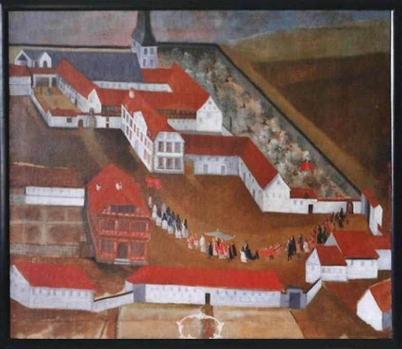 Kloster Heiningen, Gemälde aus dem frühen 18. Jahrhundert, im Klosterhof Prozession